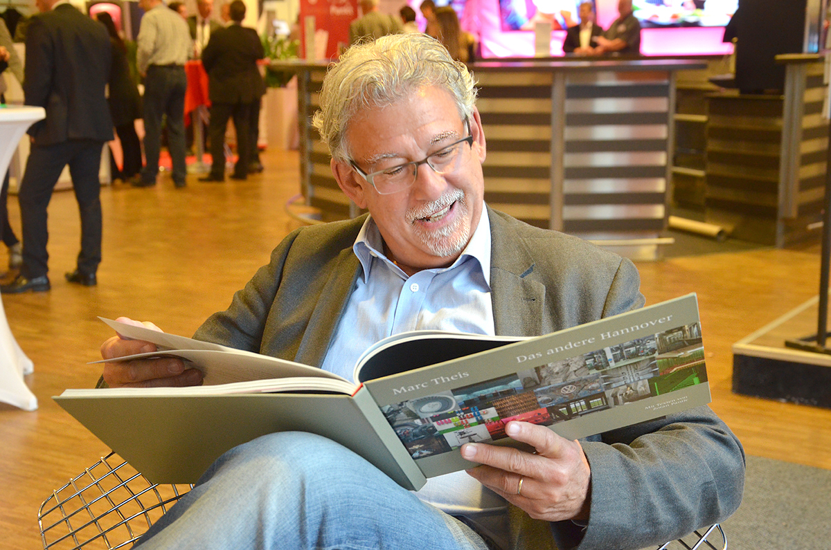 Gesehen am 7. Oktober 2015 in der HDI-Arena während der fünften Wirtschaftsmesse Hannover: Der in Luxemburg geborene Fotograf Marc Theis beim Betrachten seines neuesten Buches mit dem Titel Das andere Hannover ...